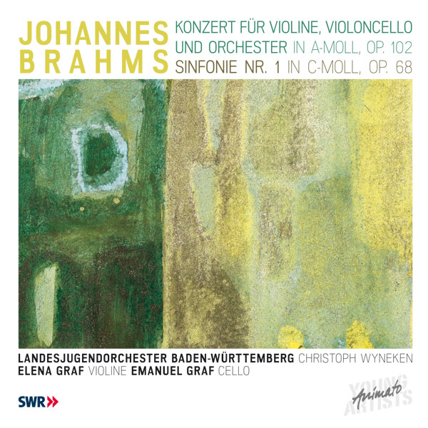 Cover der CD "JOHANNES BRAHMS: Konzert für Violine, Violoncello und Orchester in a-Moll, op. 102; Sinfonie Nr. 1 in c-Moll, op. 68" des Landesjugendorchesters Baden-Württemberg